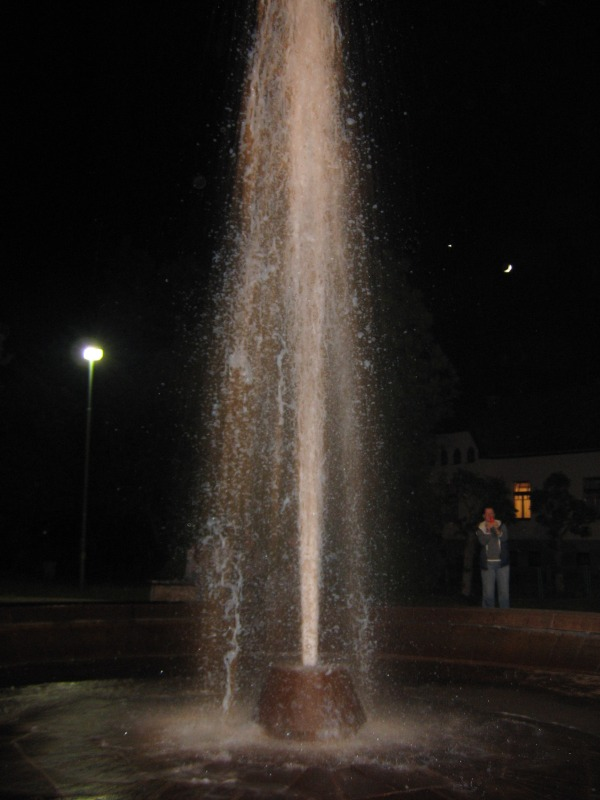 Nočná erupcia herlianskeho gejzíru